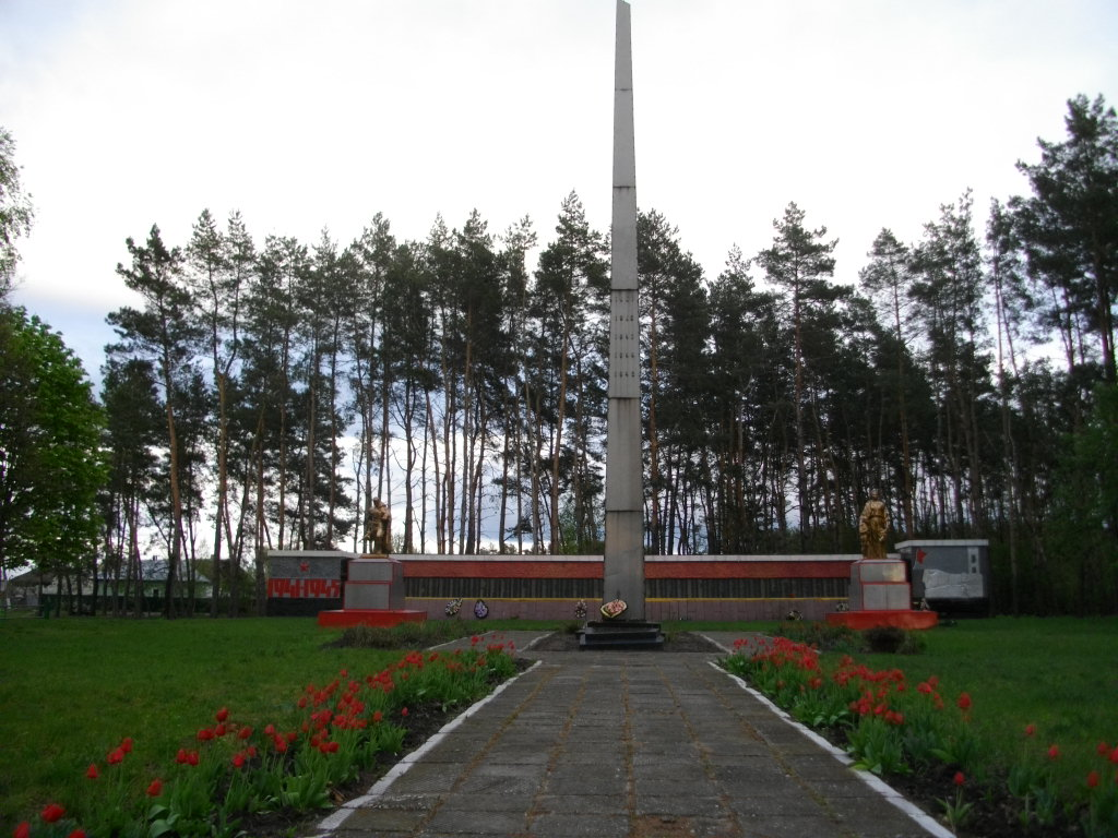 Фото було зроблено у селі Курінь на відпочинку у бабусі. На фототографії меморіал загиблим у Великій Вітчизняній Війні.